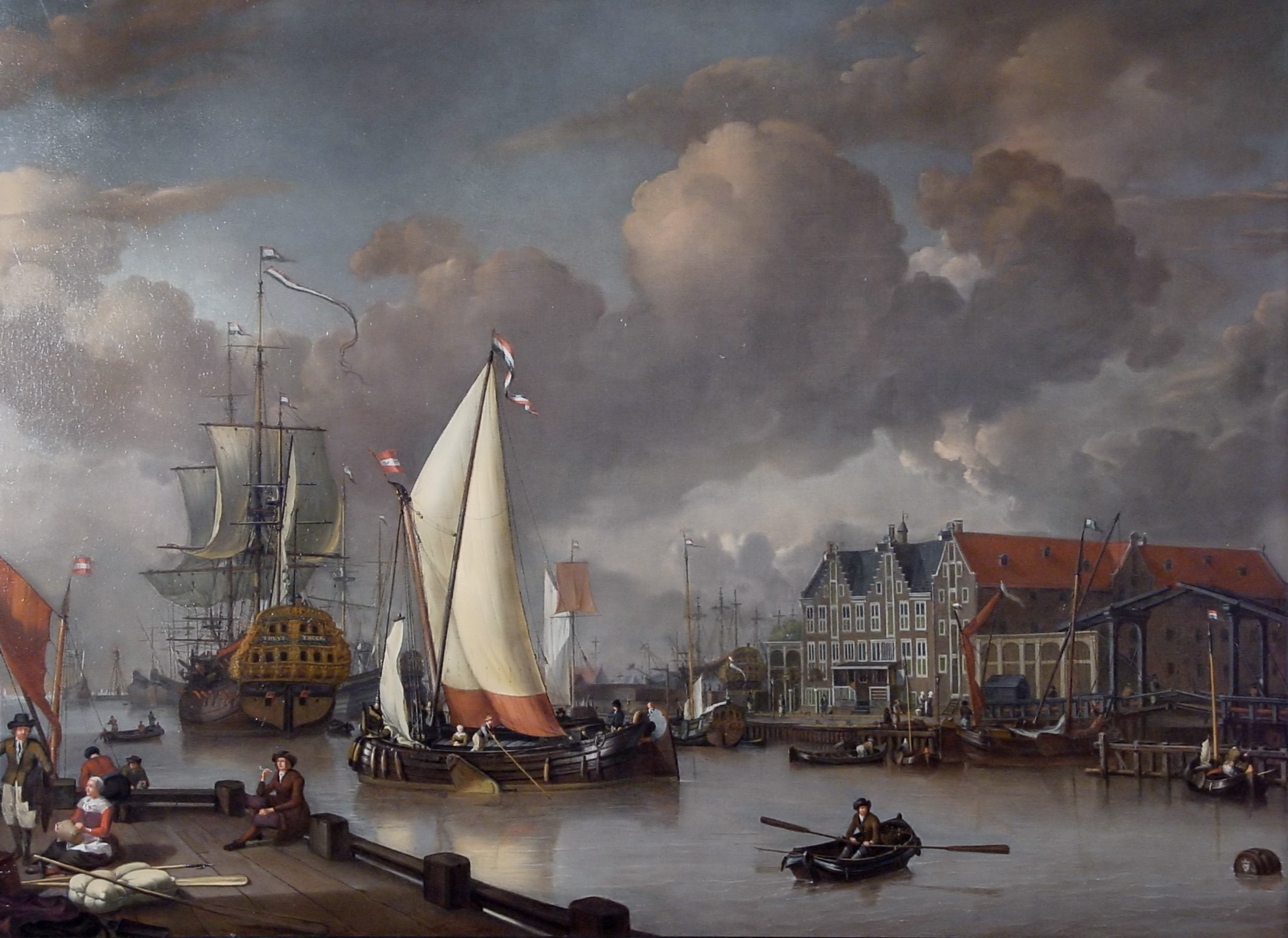 View on Oostereiland.